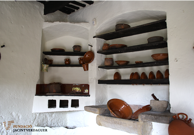 Cuina de la Casa Museu Verdaguer de Folgueroles. Hi podem observar la lleixa amb els utensilis del segle XIX, època en què hi va viure el poeta Jacint Verdaguer.